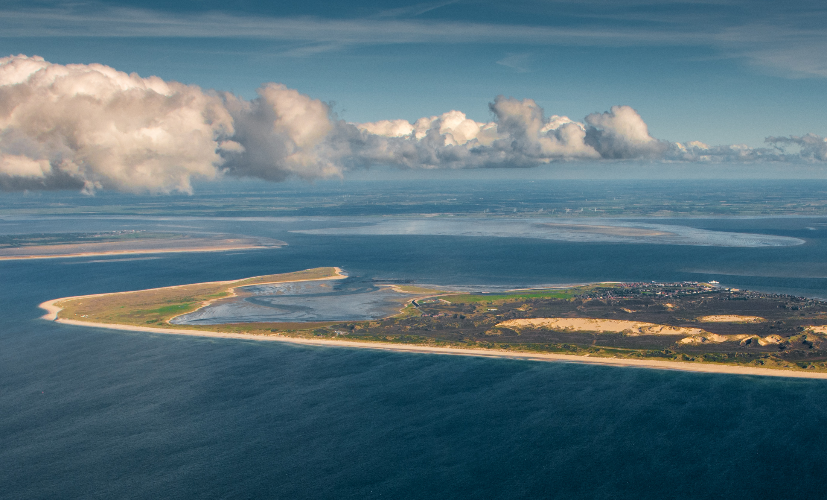 Jorsand, Uthörn, Lister Tief im Norden von Sylt